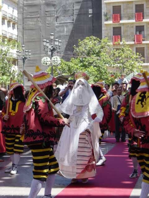 Detall de la processó de Corpus de València. Ball de la Moma.